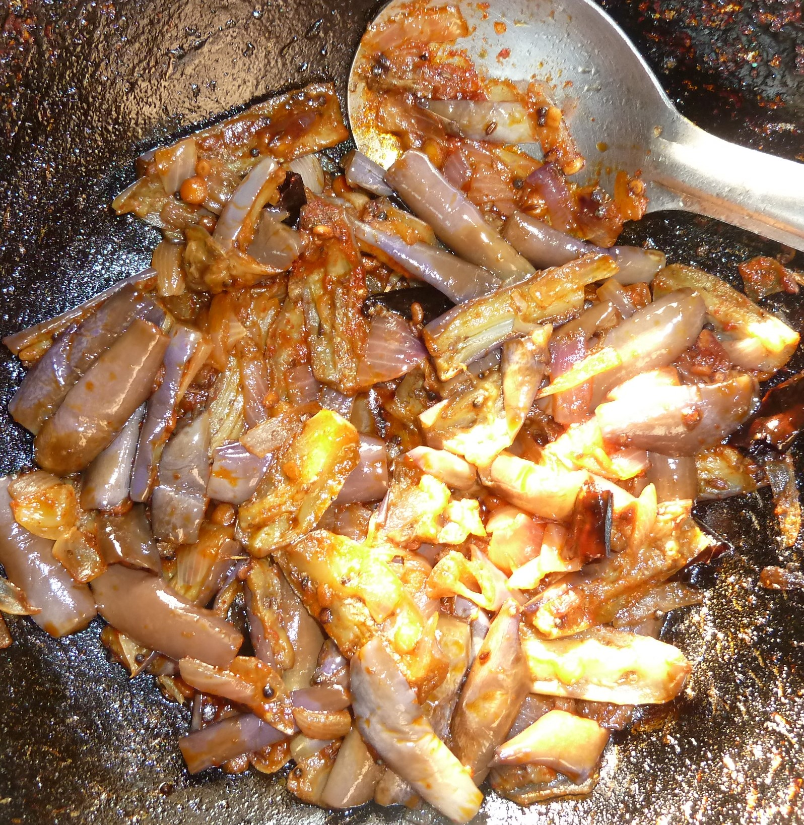 వంకాయ ఉల్లిపాయ పోపు కూర